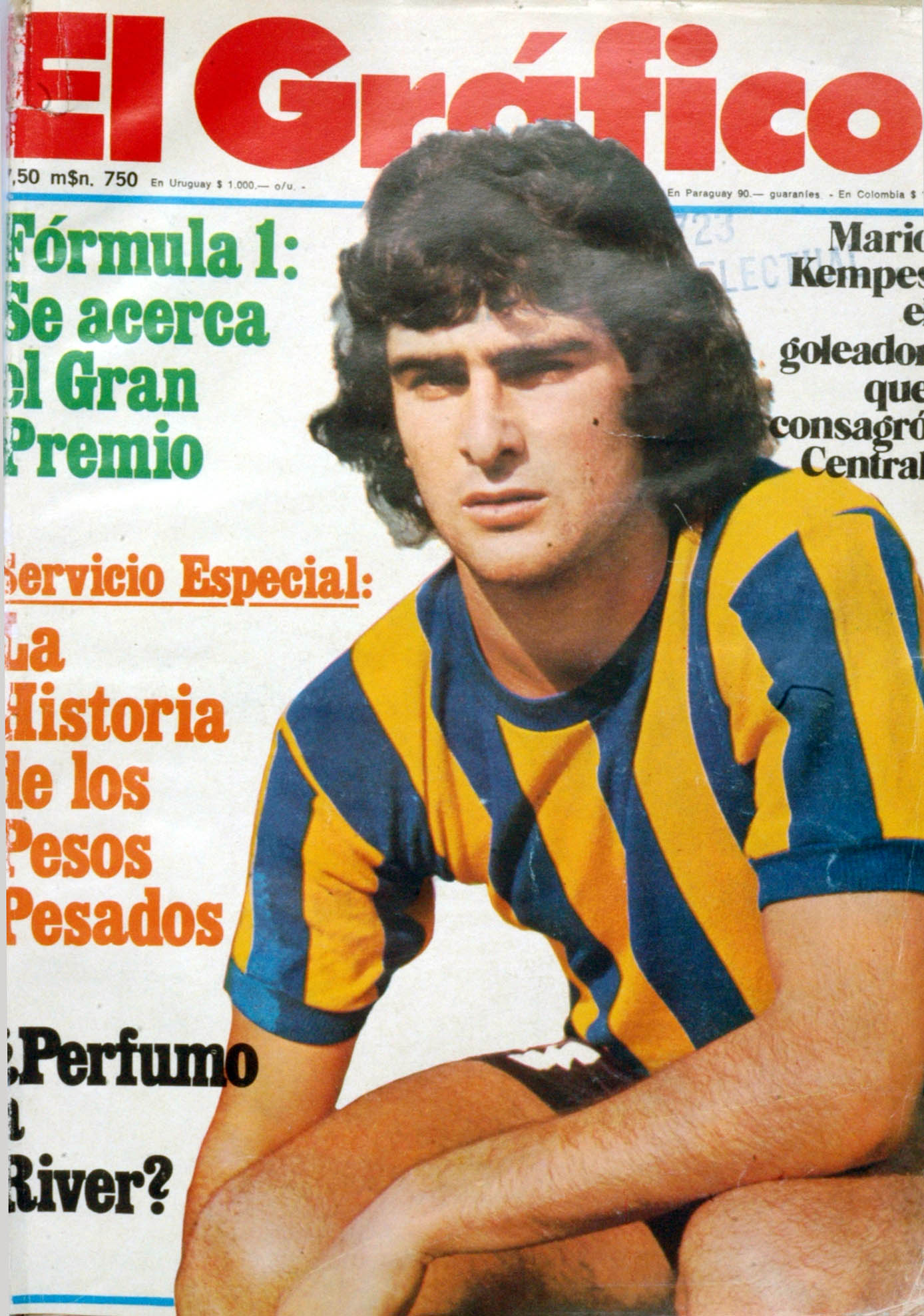 El Grafico del 01 de Enero de 1975. Edicion 2882